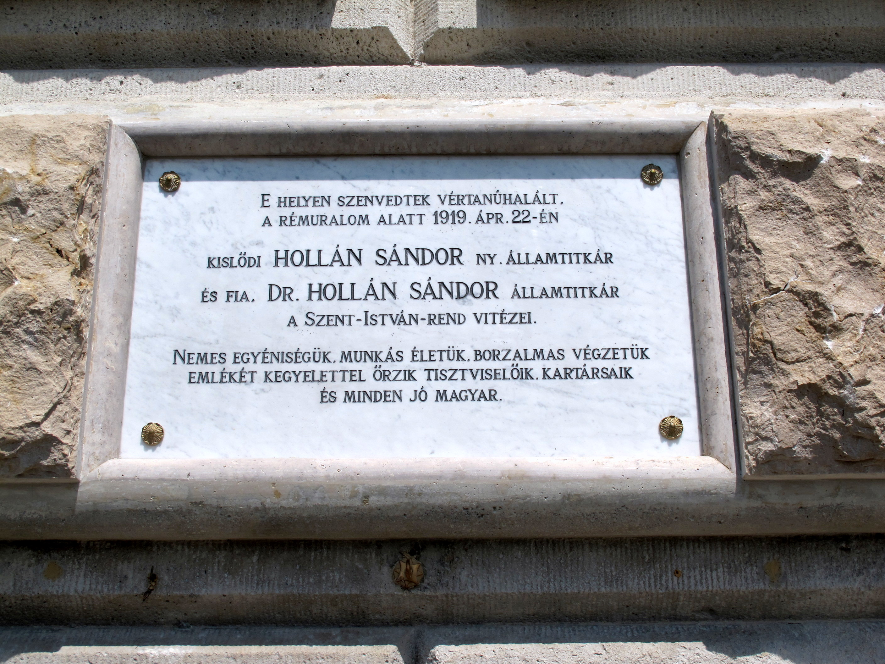 Lánchíd This is a photo of a monument in Hungary. Identifier: 17